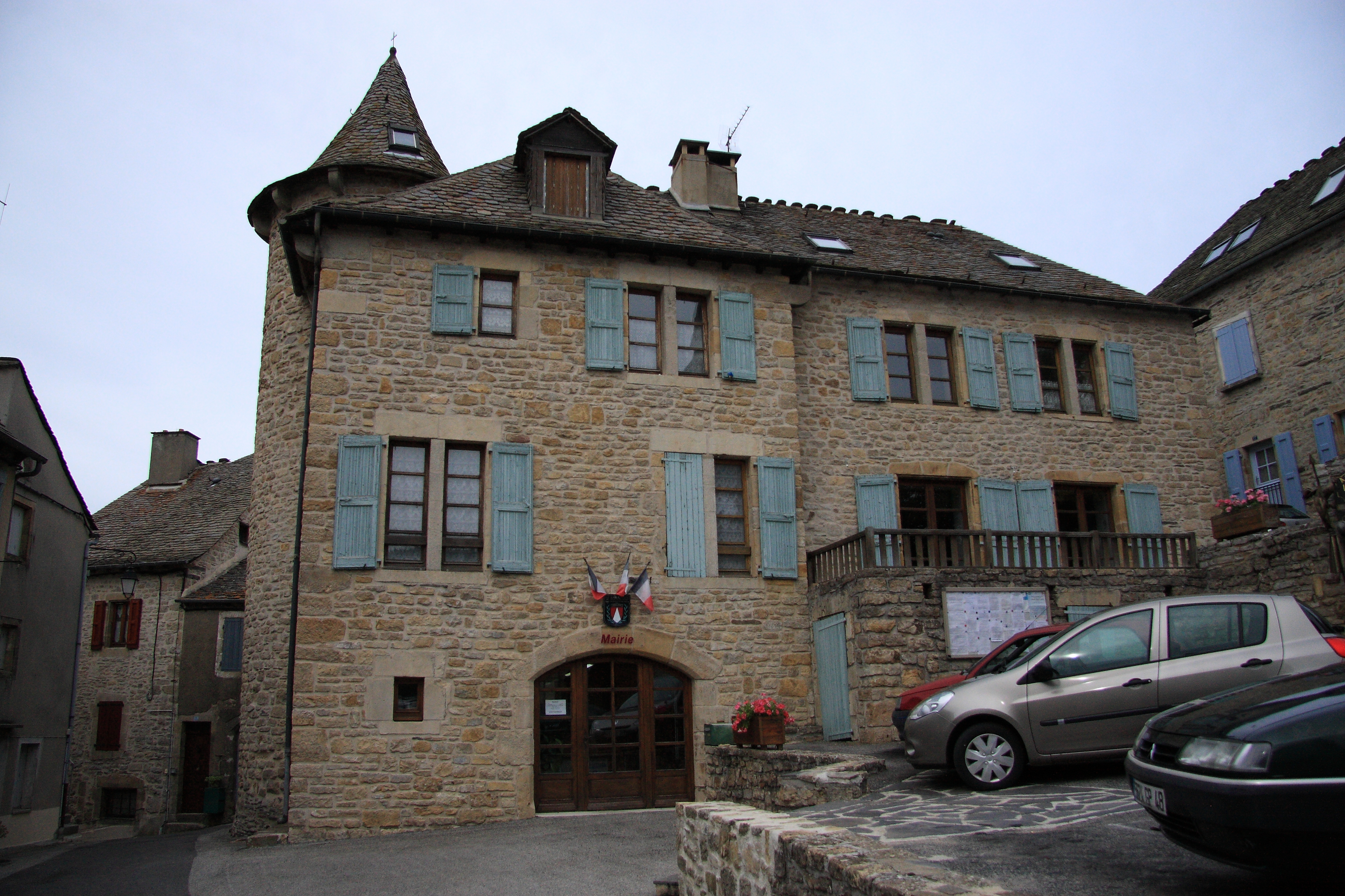 Mairie du Bleymard en Lozère